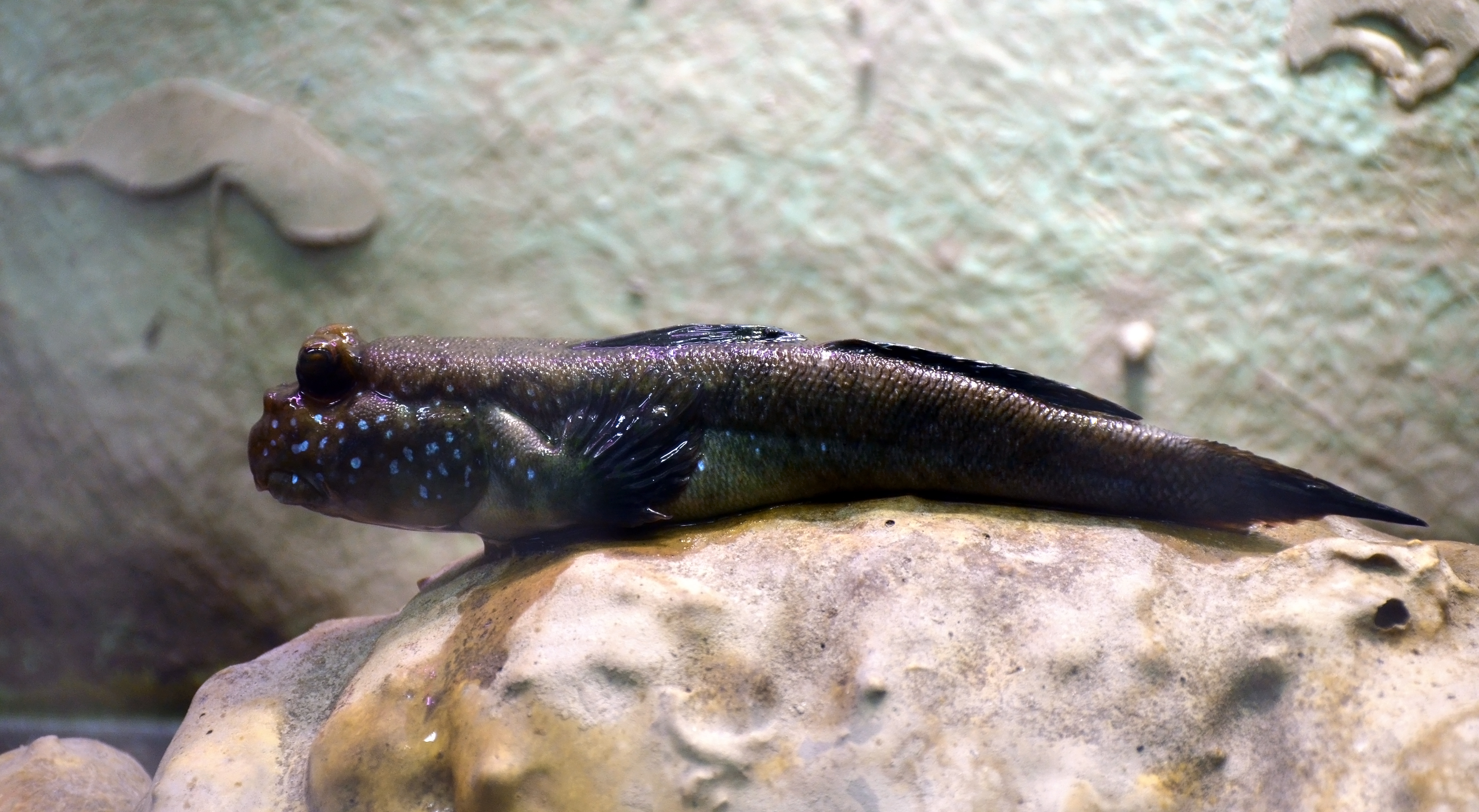 Gobie sauteur ( periophtalmus barbarus ) à l'aquarium de Canet-en-Roussillon.